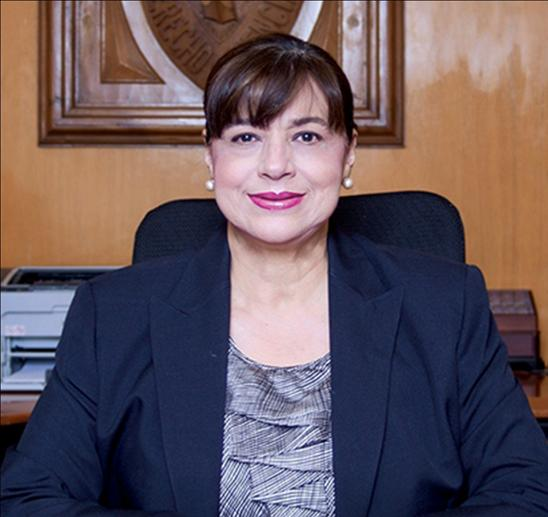 Dra. María Leoba Castañeda Rivas